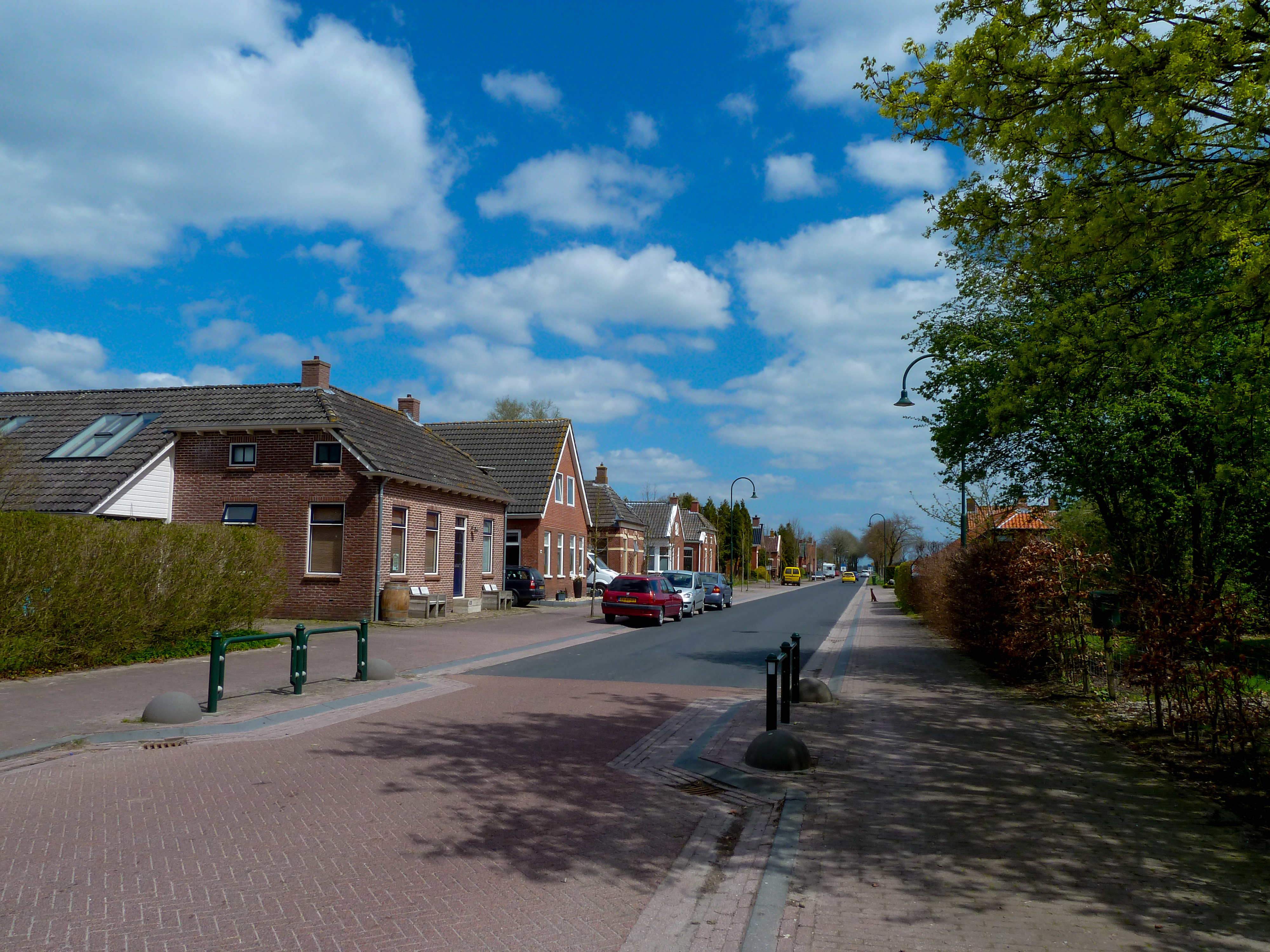 Straatbeeld Graauwedijk in Overschild